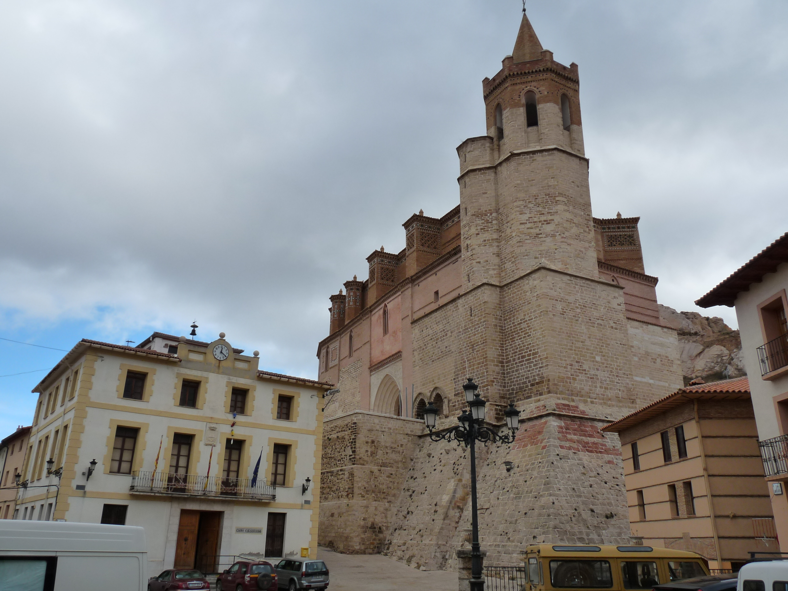 Montalbán - Ayuntamiento e Iglesia del Apóstol Santiago el Mayor (si. XIII y XIV)